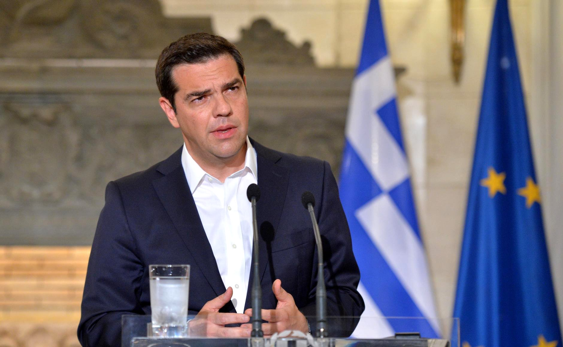 Ο Α. Τσίπρας